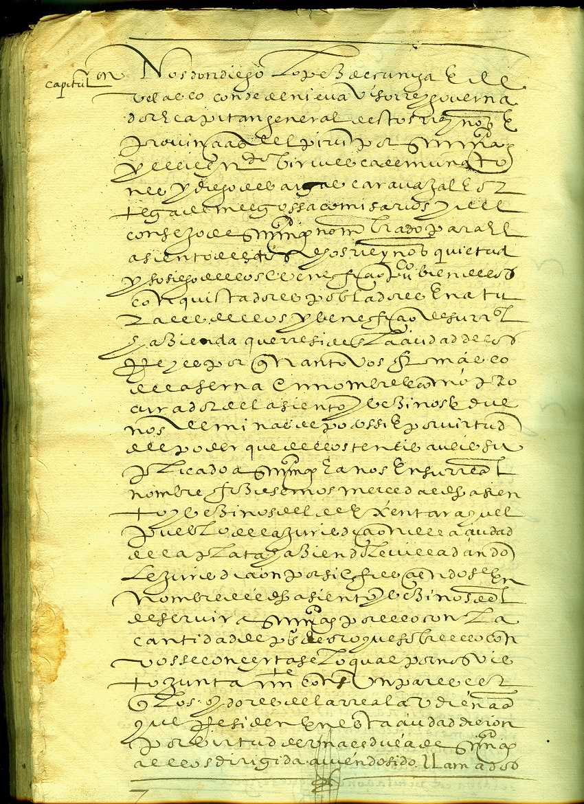 Parte del manuscrito que se refiere a la Capitulación de Potosí en 1561 ante el Virrey del Perú